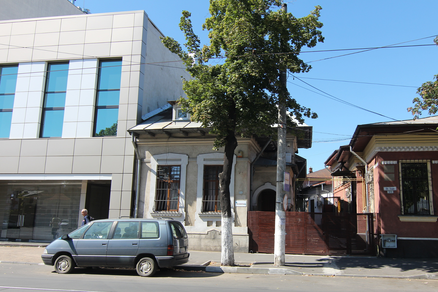 Casă pe strada Traian